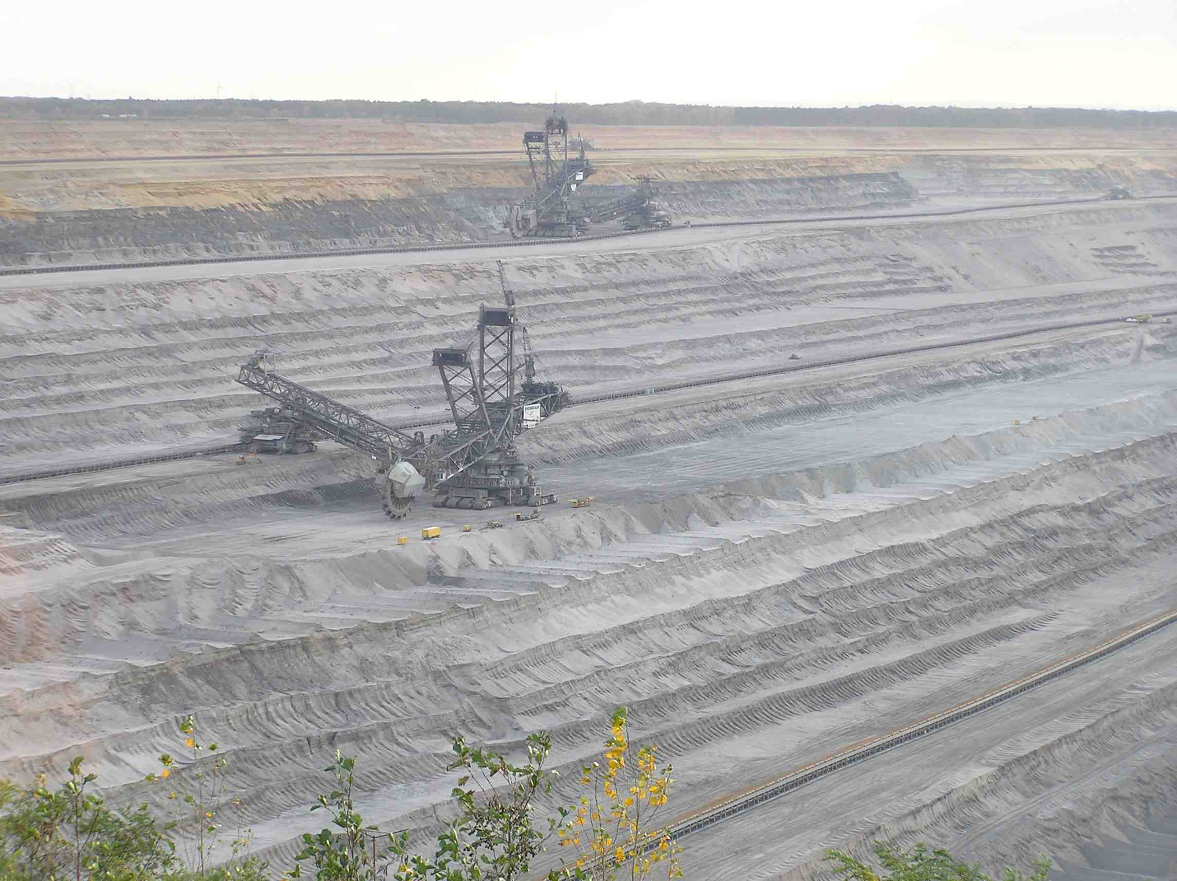 Gewinnungsseite des Tagebaus Hambach im Rheinland